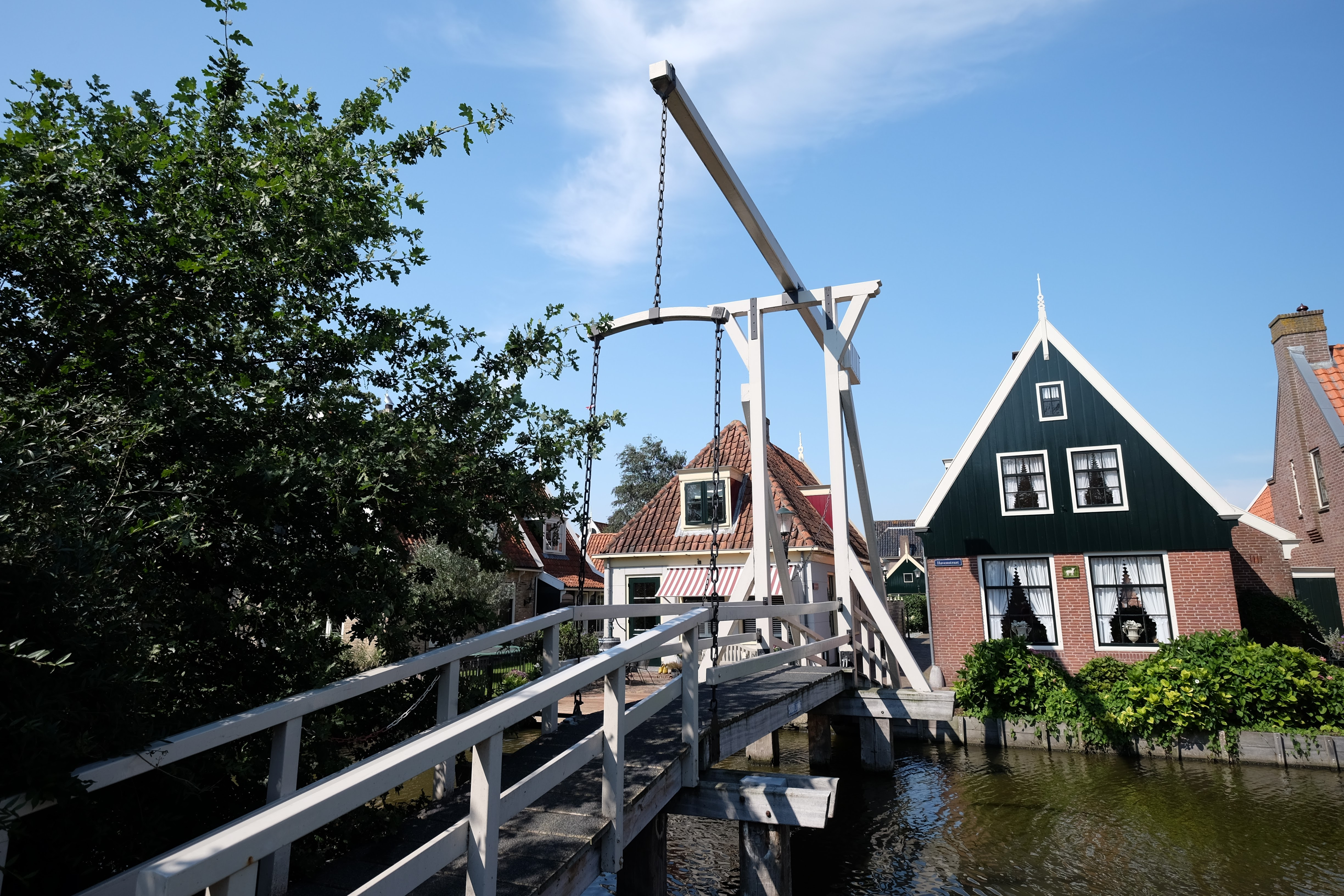 1483 De Rijp, Netherlands